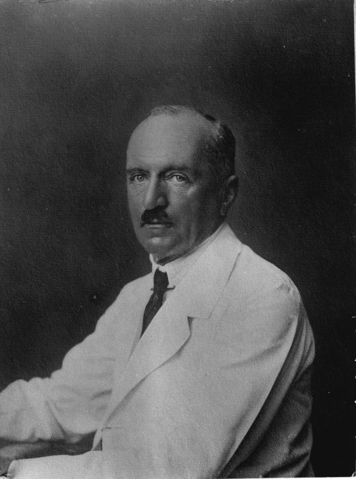 Foto. De overjarige cultures ter oostkust van Sumatra in woord en beeld. Door de A.V.R.O.S. eerbiedig opgedragen aan Z.E. den Gouverneur-Generaal van Nederlandsch-Indië Mr. D. Fock. De Heer V. Ris, eerste voorzitter van de A.V.R.O.S. (Algemeene Vereeniging van Rubberplanters ter Oostkust van Sumatra) in Medan